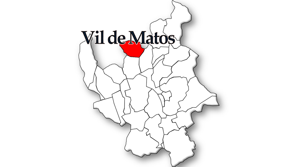 População